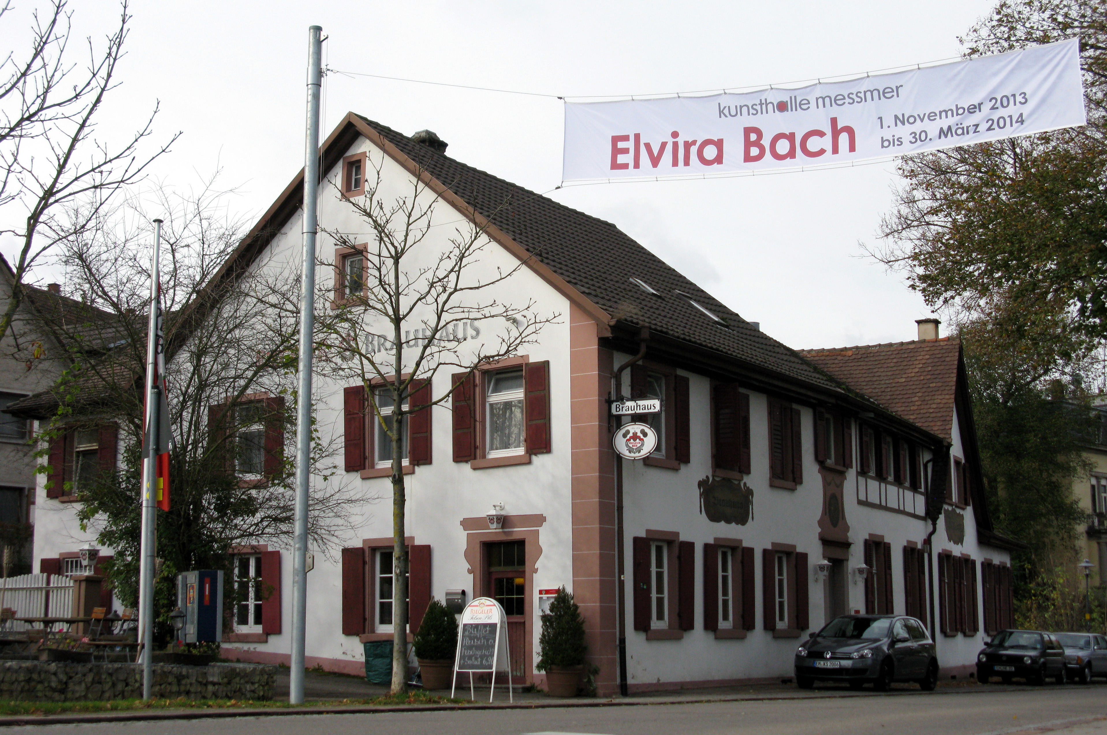 Brauhaus Gaststätte in Riegel